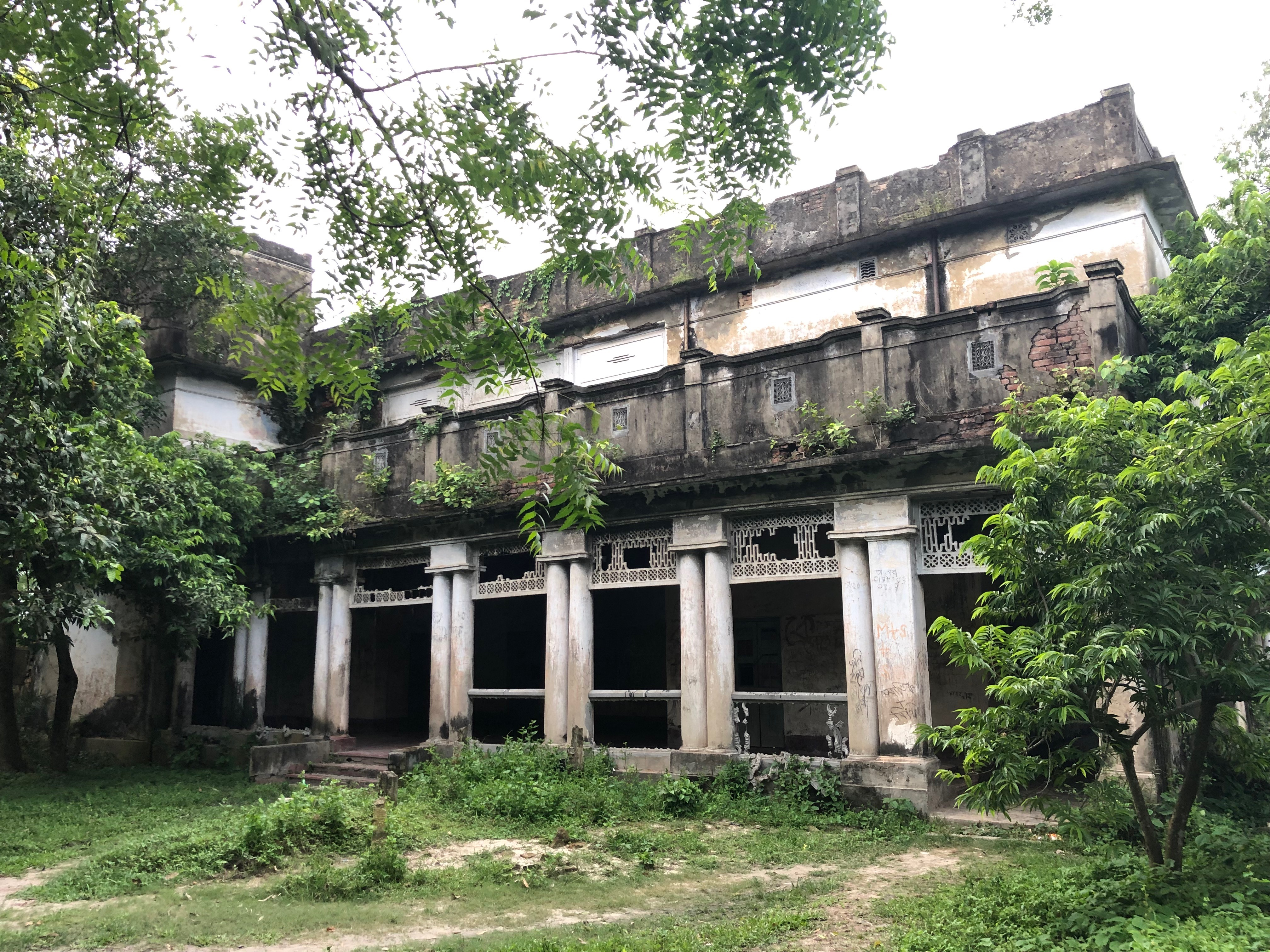 গুনাহার জমিদার বাড়ির পিছনের অংশ